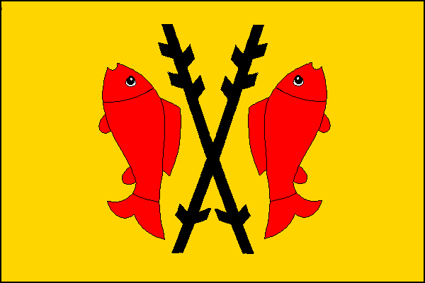 vlajka,Dyjákovice , okres Znojmo